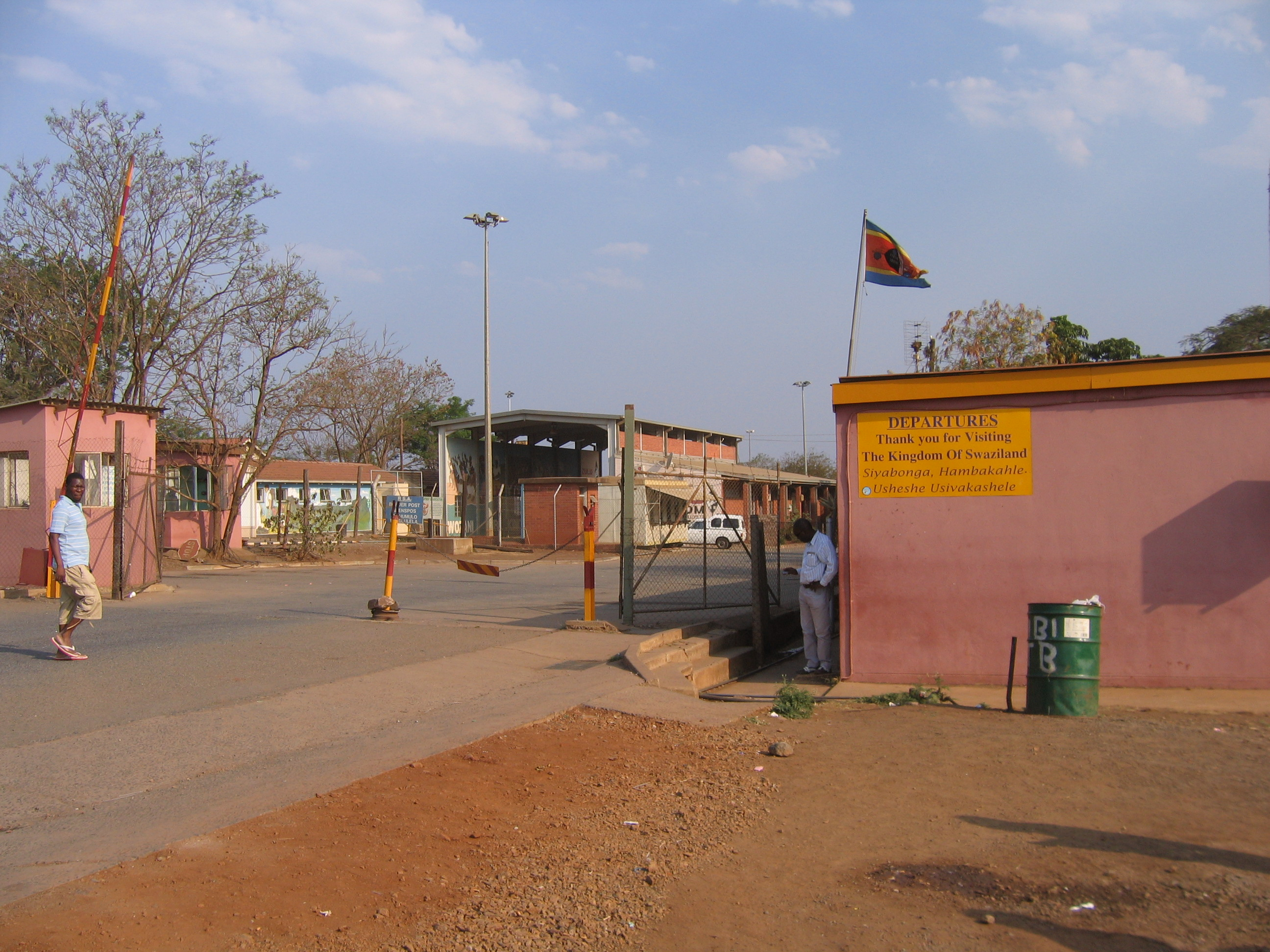 A la frontière du Royaume du Eswatini Mantenga Swazi Cultural Village